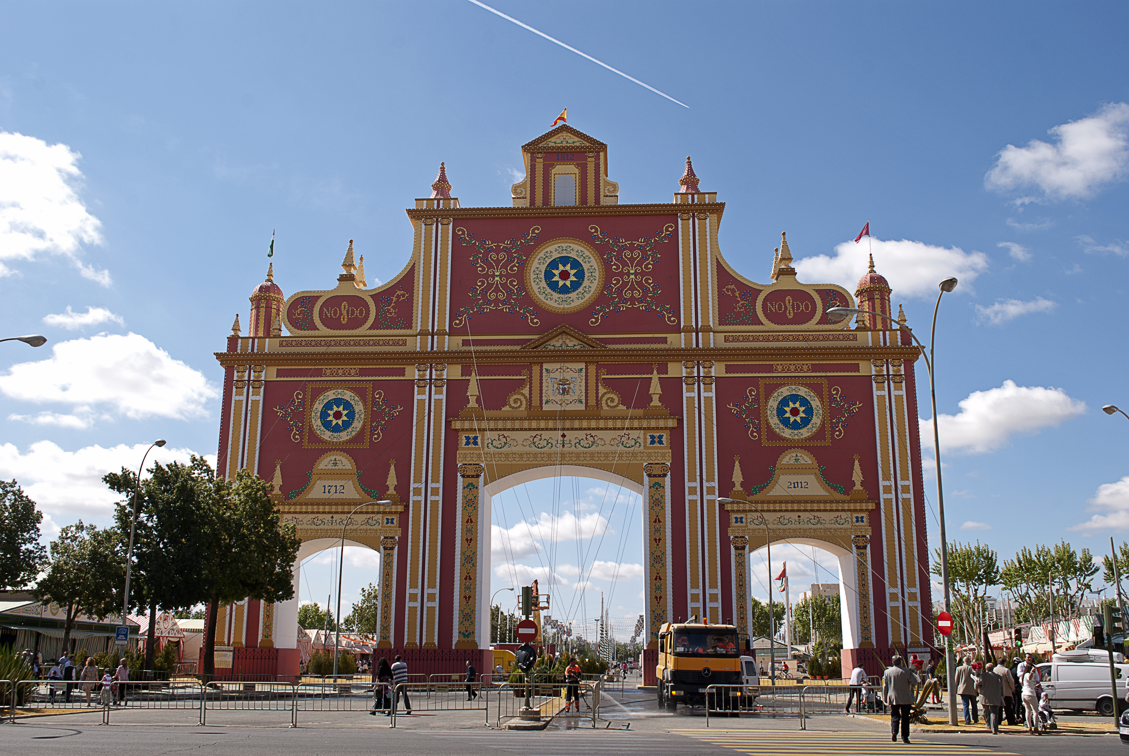 Portada de la Feria de Sevilla 2012, inspirada en la fachada de la iglesia del Salvador de Sevilla.